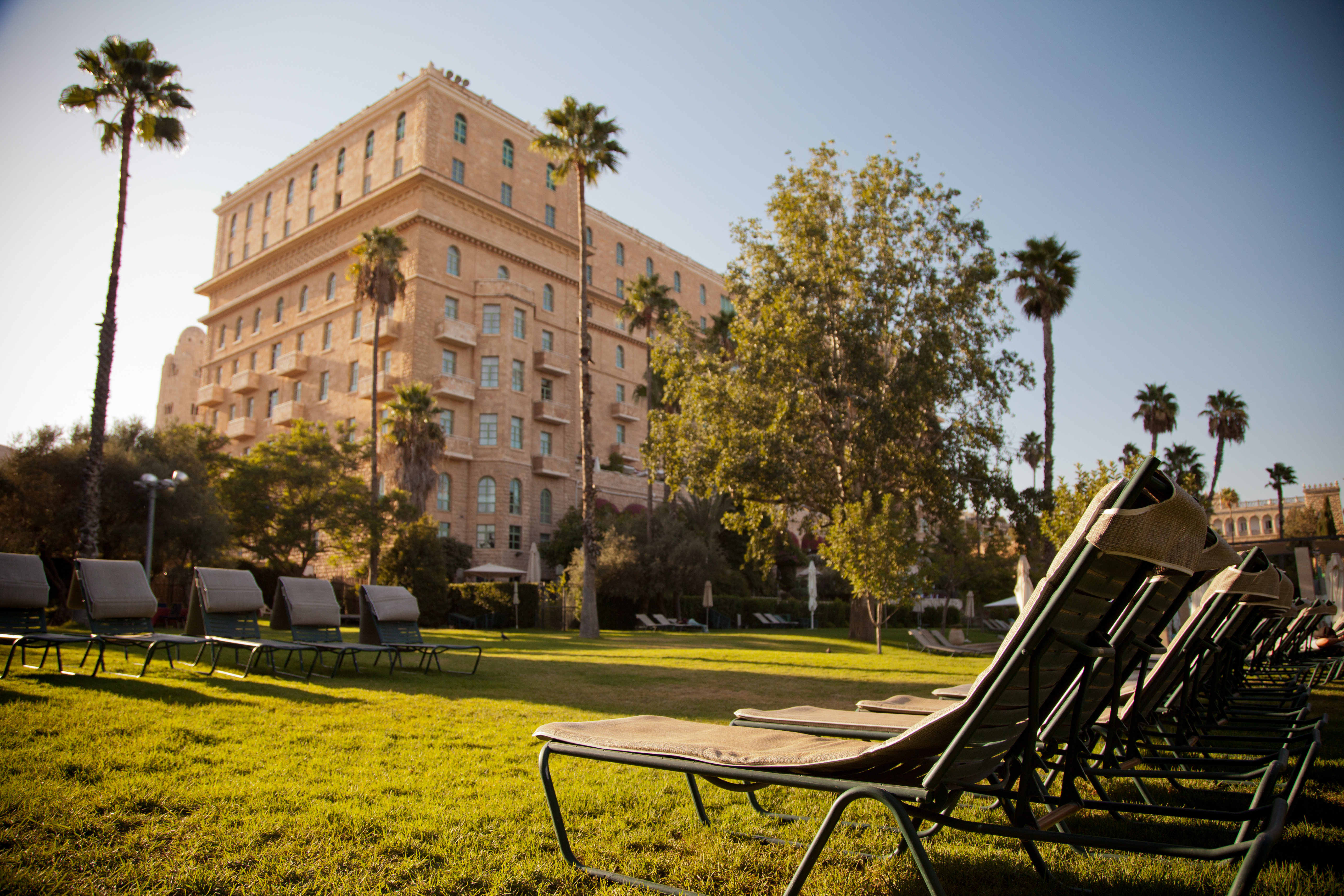 מלון המלך דוד